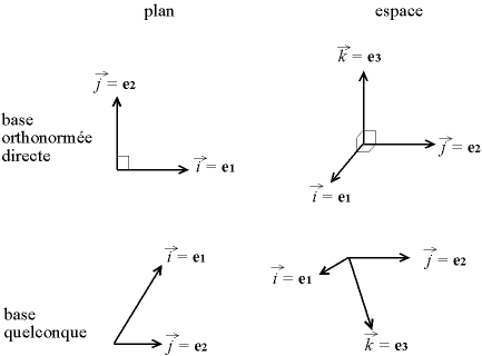 Base orthonormée directe et quelconque, du plan et de l'espace.